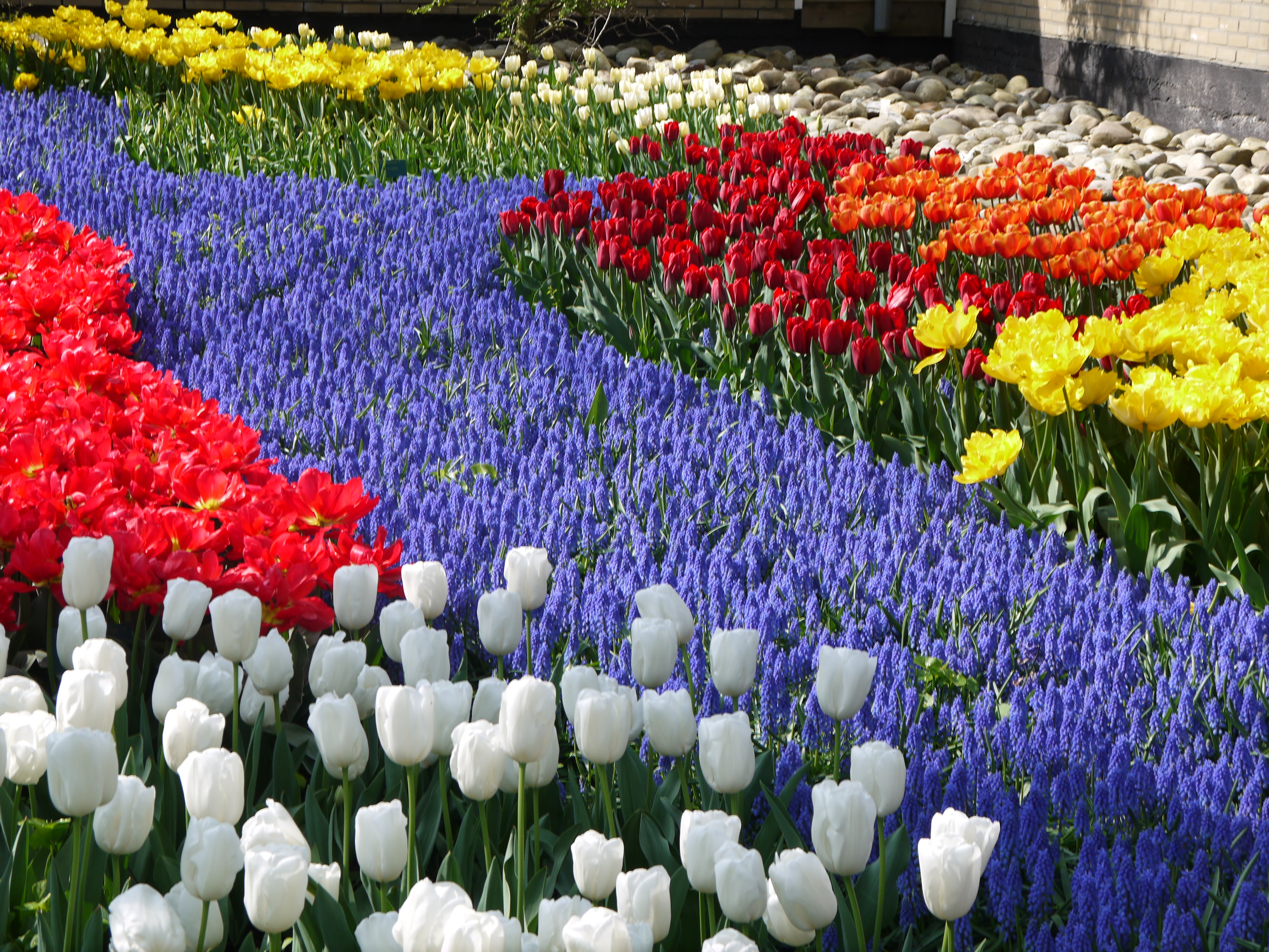 Holandia Keukenhof